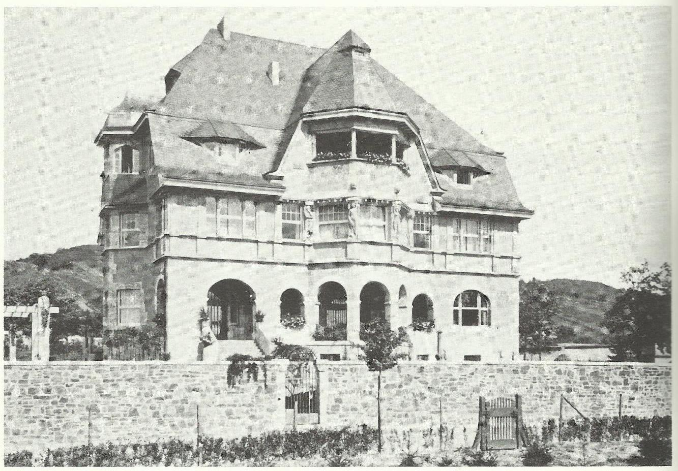 Feuerschlößchen, Bad Honnef, Westansicht des Hauptgebäudes, noch ohne Pergola an Nordwestecke (1911 entstanden), Loggia im Untergeschoss des Mittelrisalts noch nicht durch Fenster geschlossen